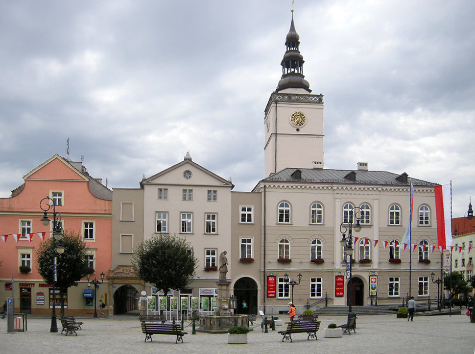 Dzierżoniów, ratusz i wieża ratuszowa, XV, 1873-1875